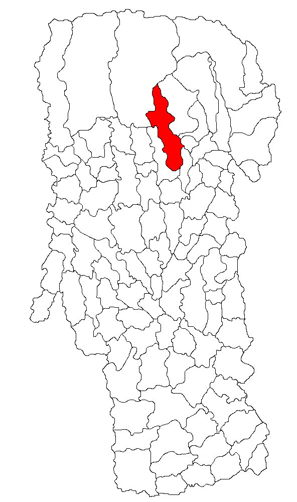 Categorie:Hărţi ale judeţului Argeş